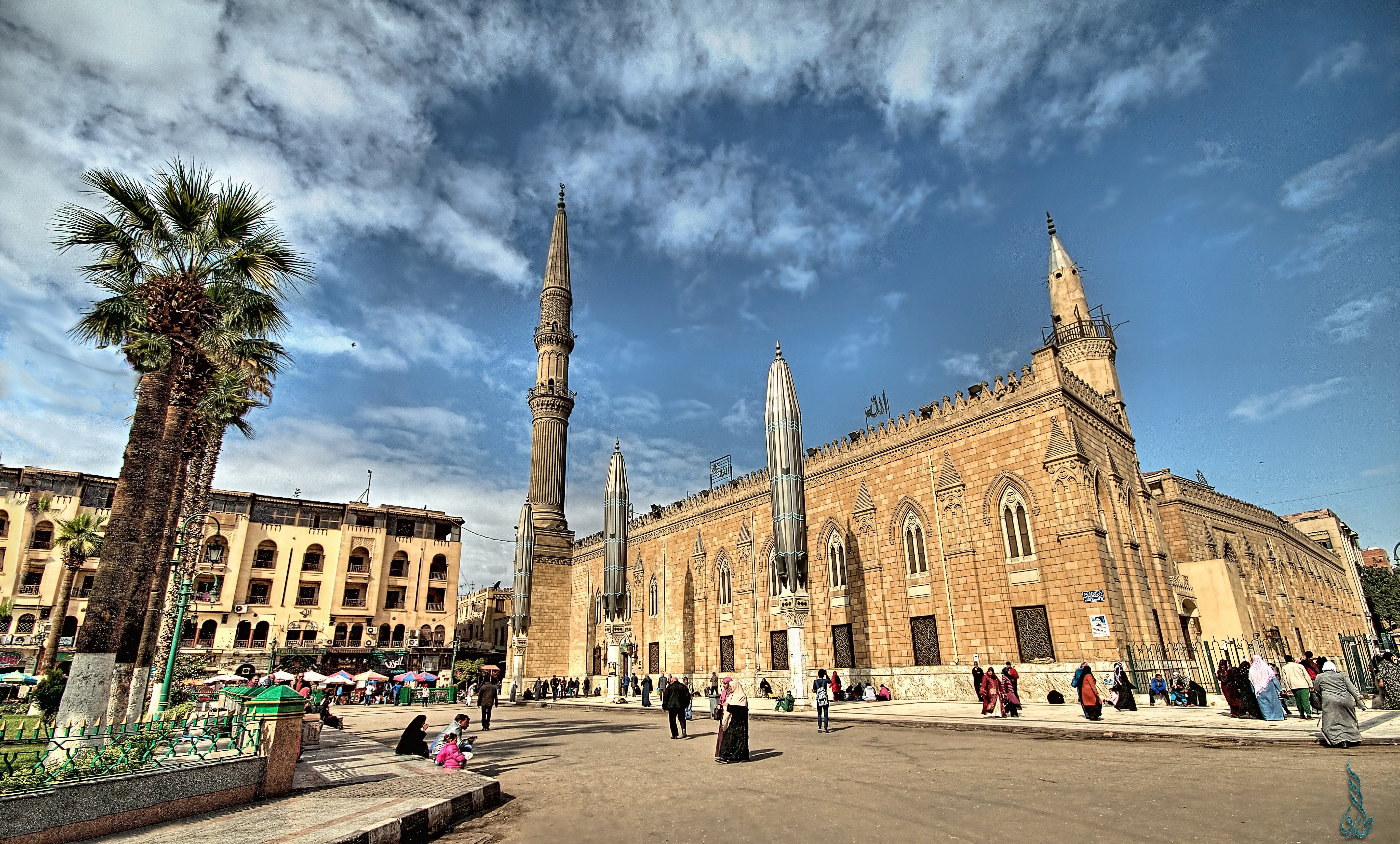 ساحة ومسجد الحسين بالقاهرة . من اهم المزارات الدينية في القاهرة